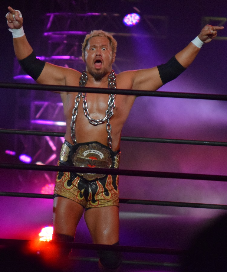 2015年8月1日 大阪府立体育会館 「G1 CLIMAX 25」 真壁刀義